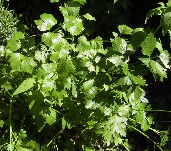 Staudensellerie